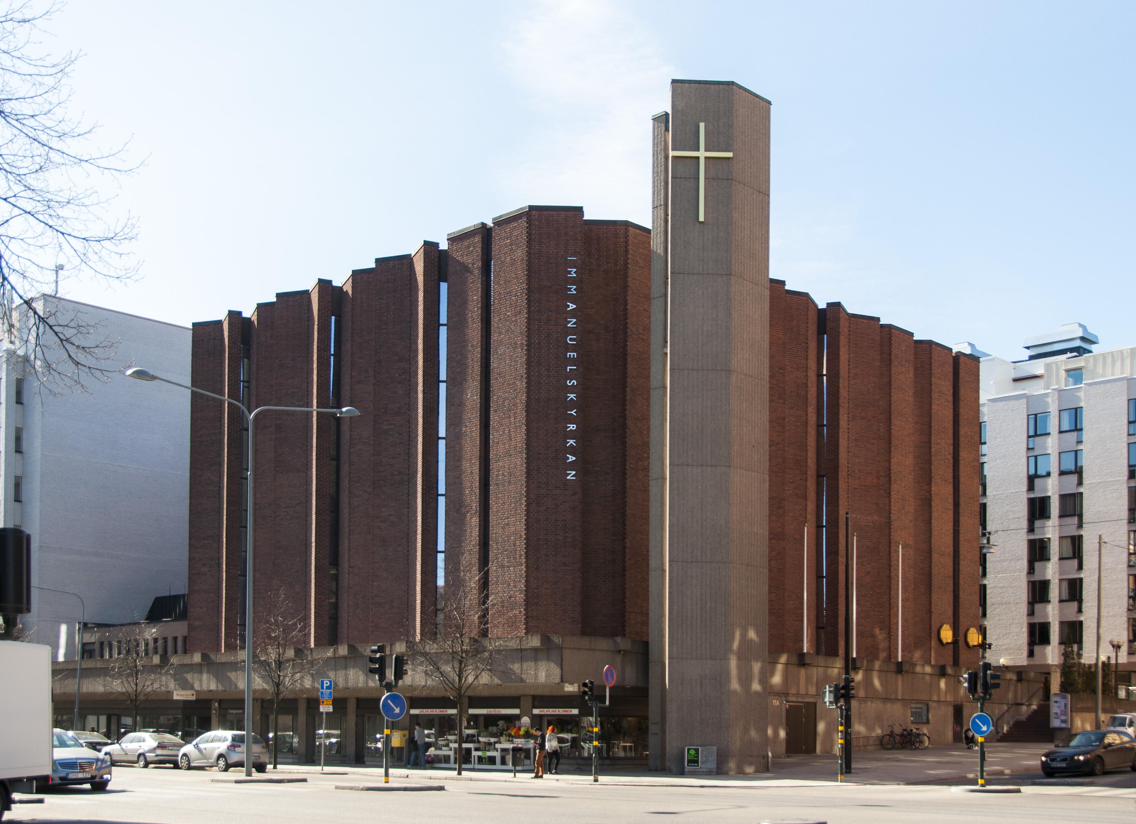 Immanuelskyrkan